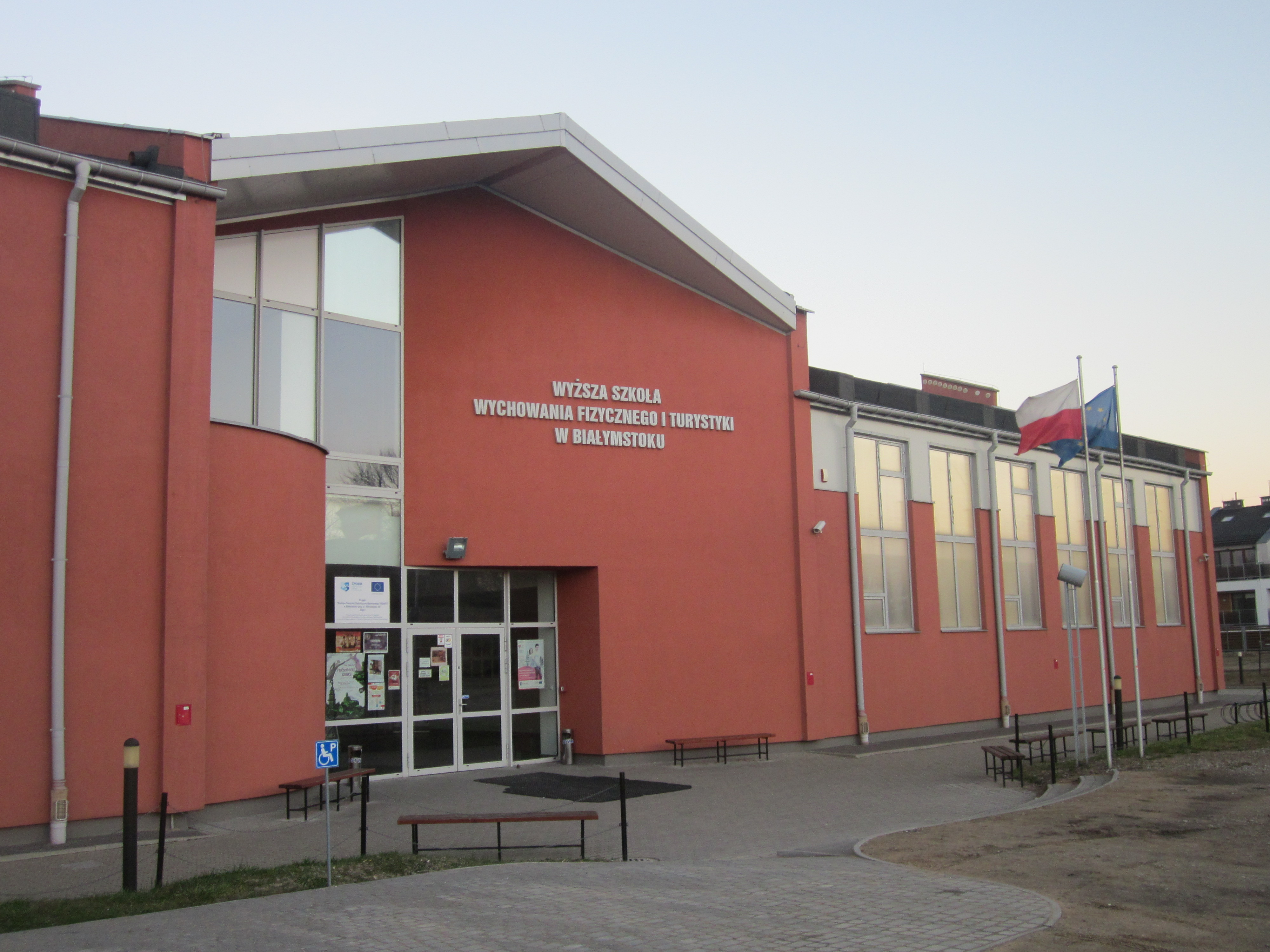 Białystok ul. Mickiewicza 49.